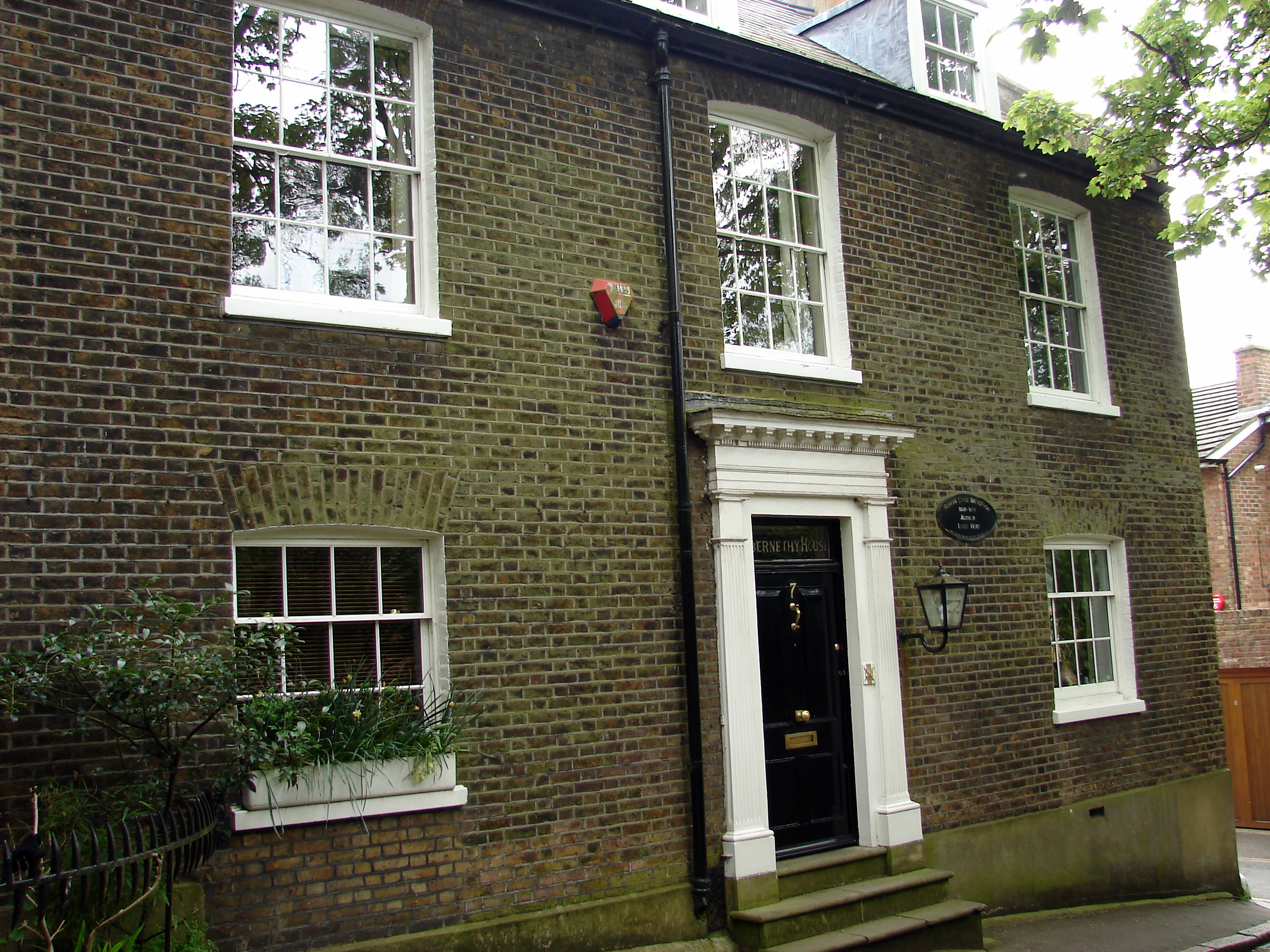 Robert Louis Stevenson